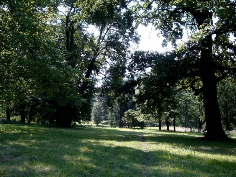 Der ca. 18 Ha große Schloss-Park von Schloss Polnisch Krawarn